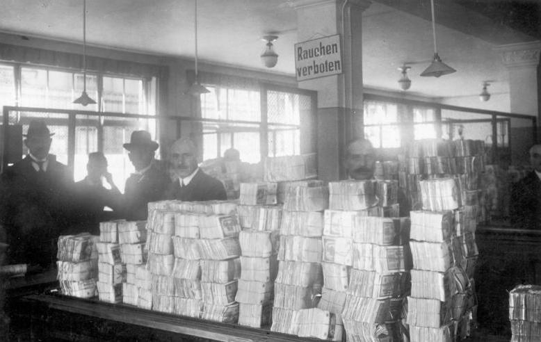 ADN-ZB Deutschland In der Geldauflieferungsstelle der Reichsbank in Berlin. (Aufnahme: Oktober 1923) 6823